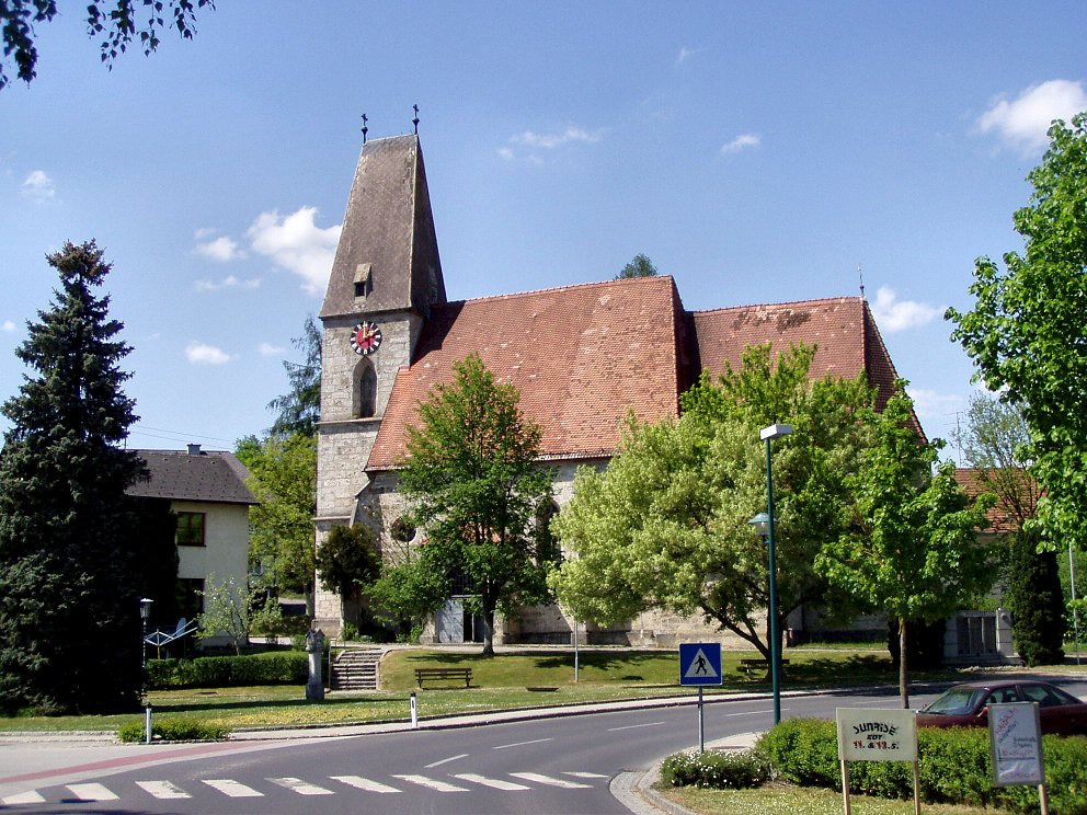 Pfarrkirche Hl. Margareta in Sipbachzell